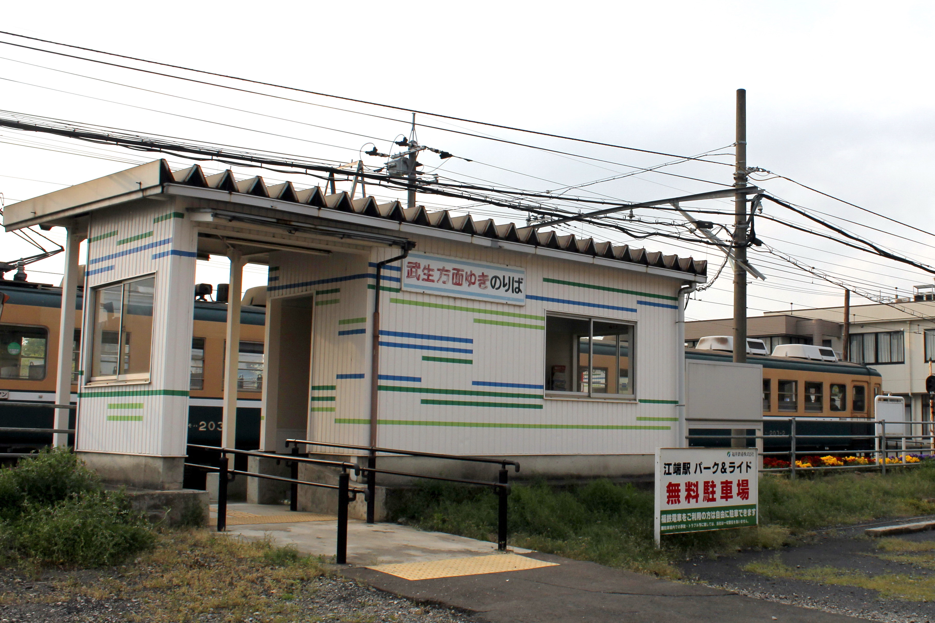 江端駅（福井鉄道）